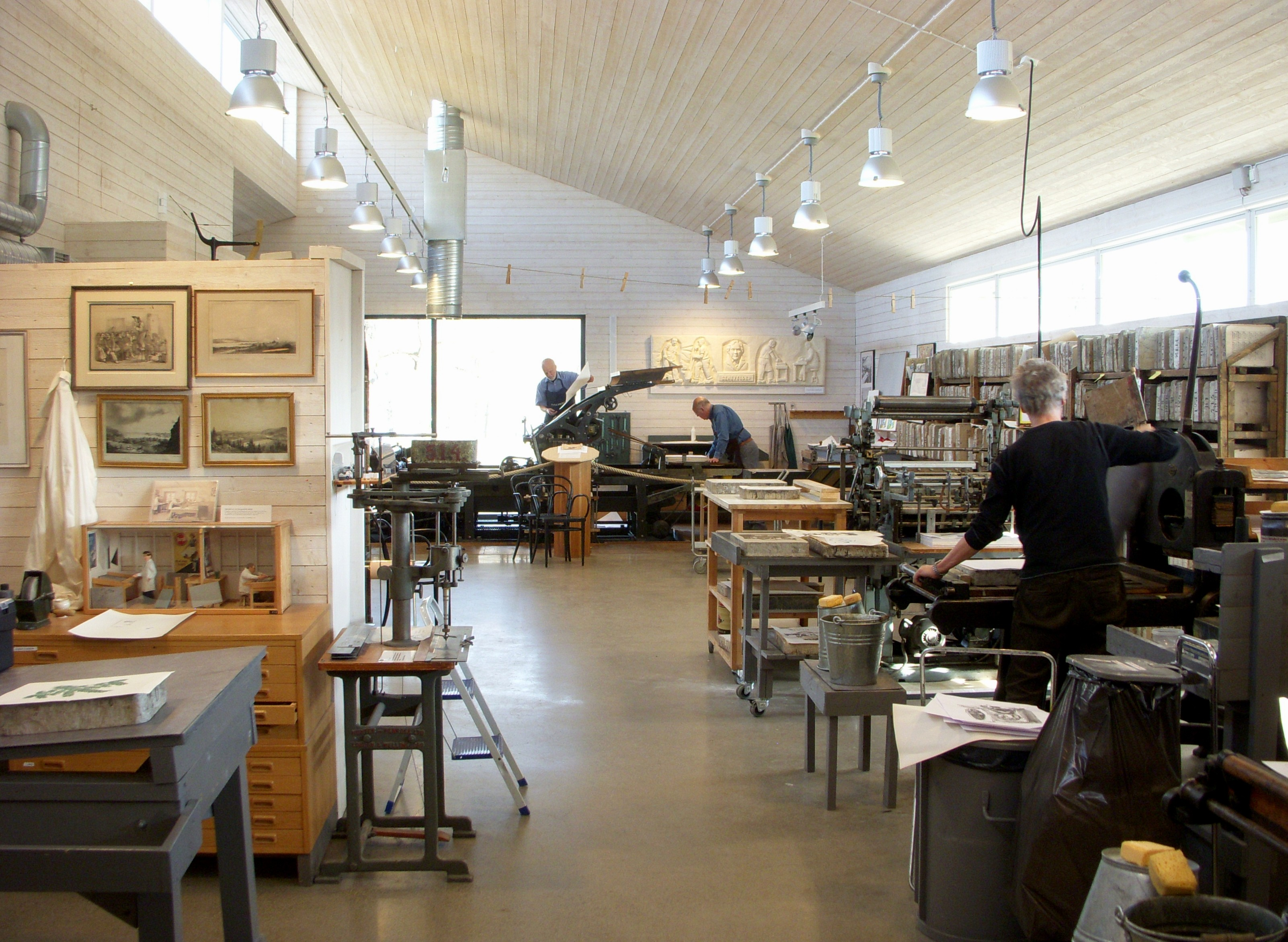 Litografiska museet vid Sundby gård i Huddinge kommun